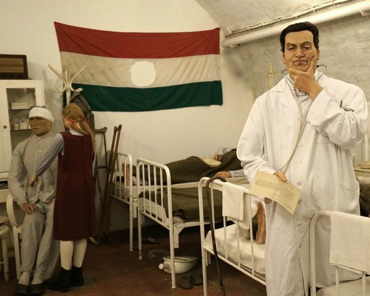 A jelenlegi '56-os kórterem